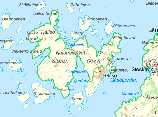 Gåsö (topografisk karta, Lantmäteriet)